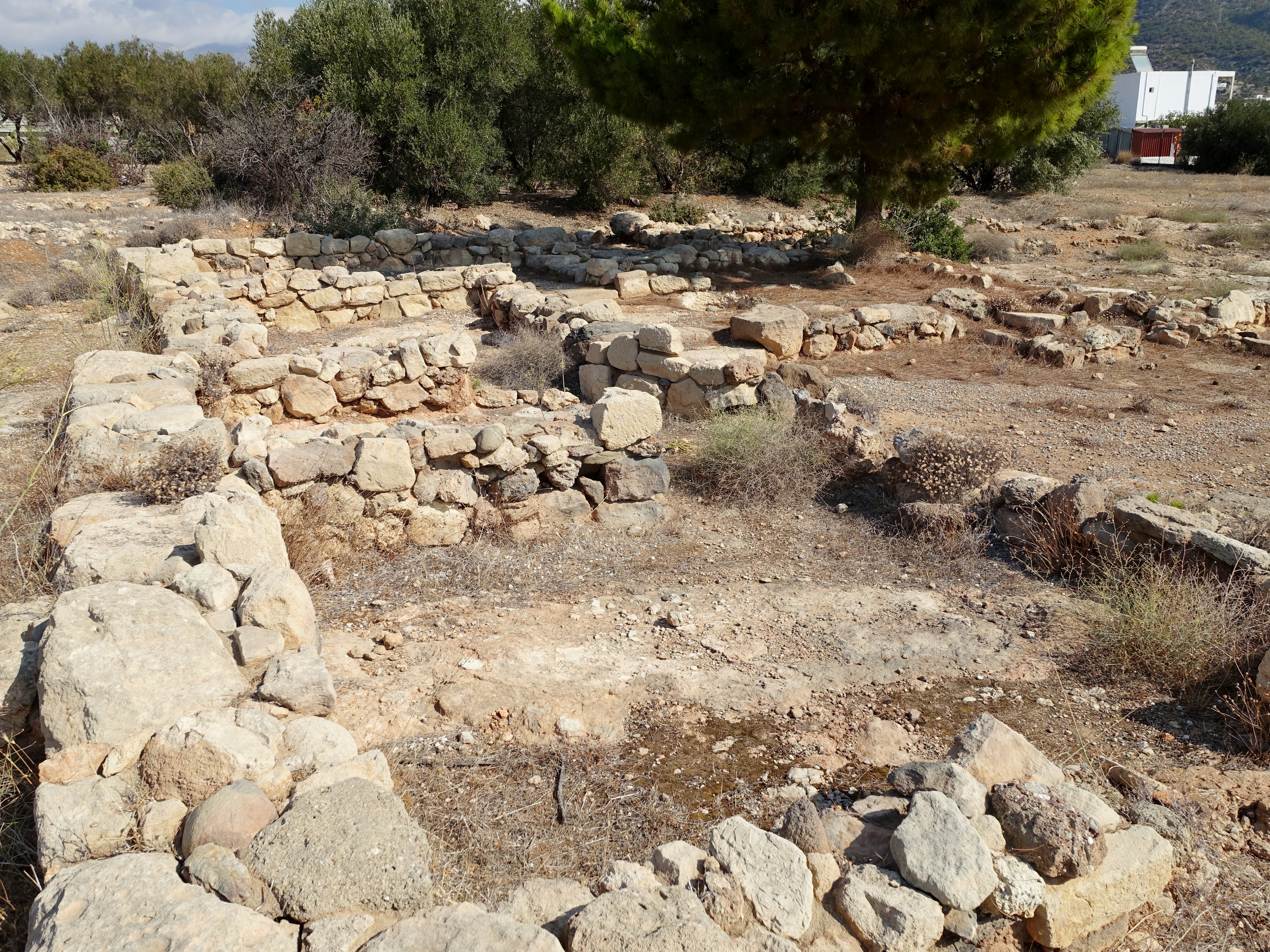 Ausgrabungsstätte der minoischen Villa von Makrygialos, Kreta, Griechenland